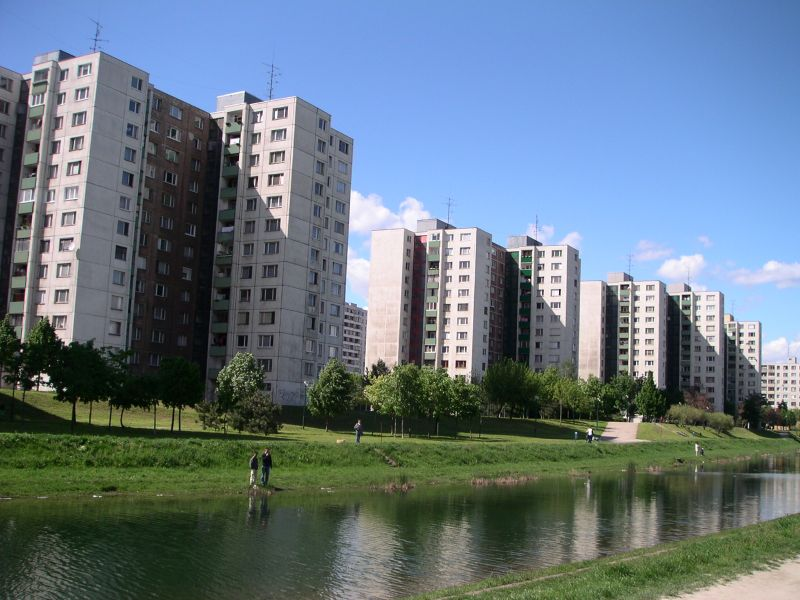 Vpredu Chorvátske rameno a panelák Ševčenkovej ulice, vzadu paneláky Hálovej ulice. Poloha: 48°07.135N 17°06.473E Mesto: Bratislava, Slovensko